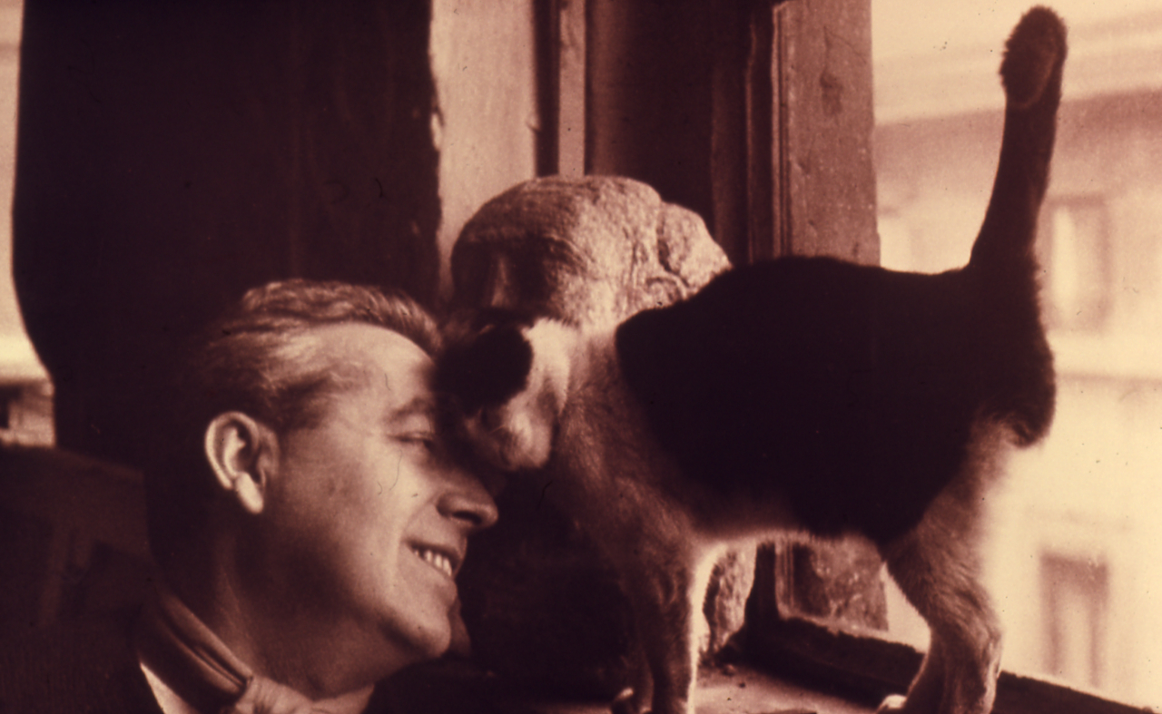 Serie fotografica : Italia, 1982 / Paolo Monti. - Foglio: 1, Fotogrammi complessivi: 5/20 : Diapositiva, sviluppo cromogeno/ pellicola ; 35 mm. - ((Cartoncino manoscritto nella scatola in cui è contenuta questa serie riportante: "Ripr. foto mosse - fiori - dett. mossi e no - ripr. foto b/n 6x6 - ripr. foto color - rivista - 2 infrarossi.". - Fonte: Agenda di Paolo Monti: Diapositive 24x36mm (1948-1982), presso Archivio Paolo Monti